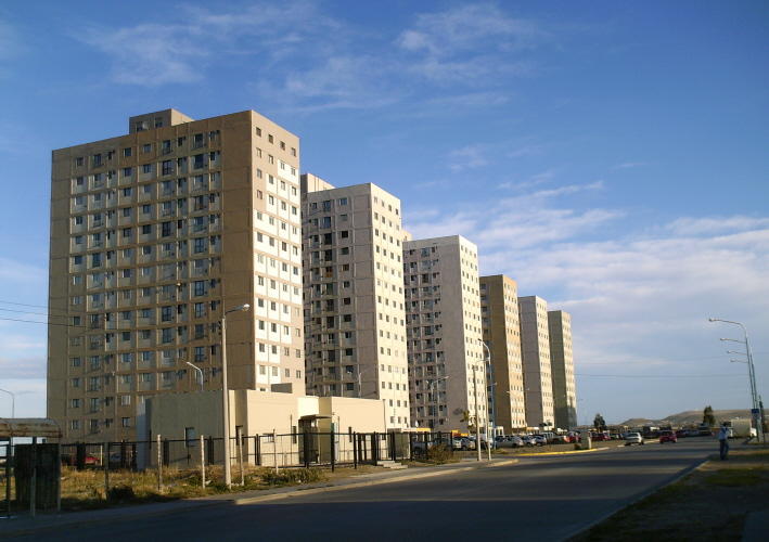 Complejo Las Torres, Comodoro Rivadavia.